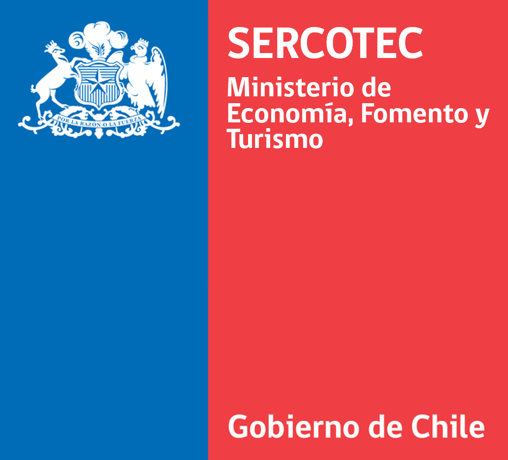 Logo Institucional del Servicio de Cooperación Técnica.